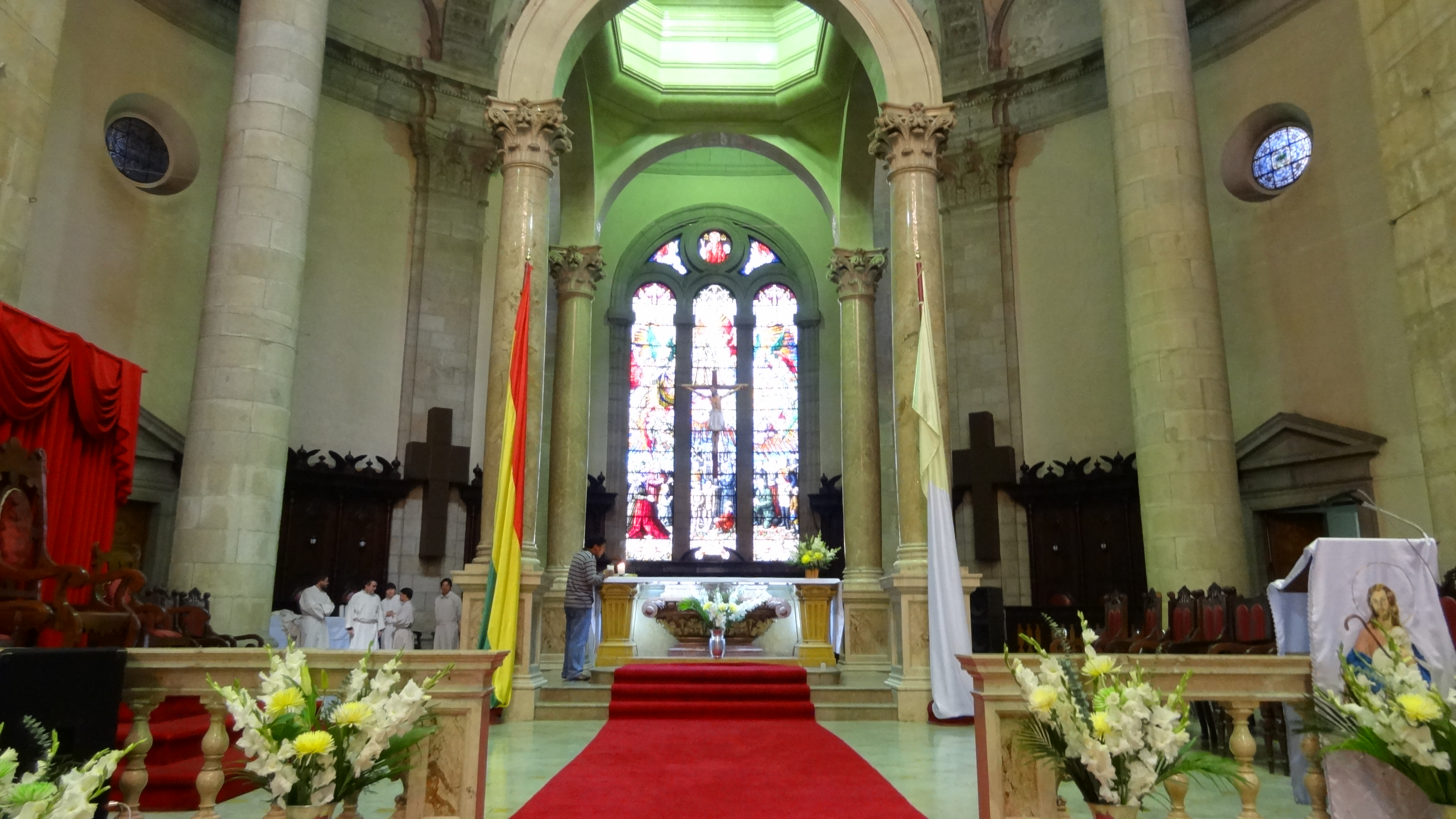 Ubicada en la Plaza Murillo, de la Ciudad de La Paz, imagen tomada dentro de la Catedral, mostrando el Altar Mayor, con el fondo de los vitrales